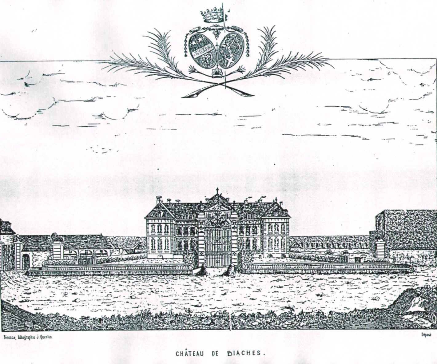 vue du château de Biaches (Somme)